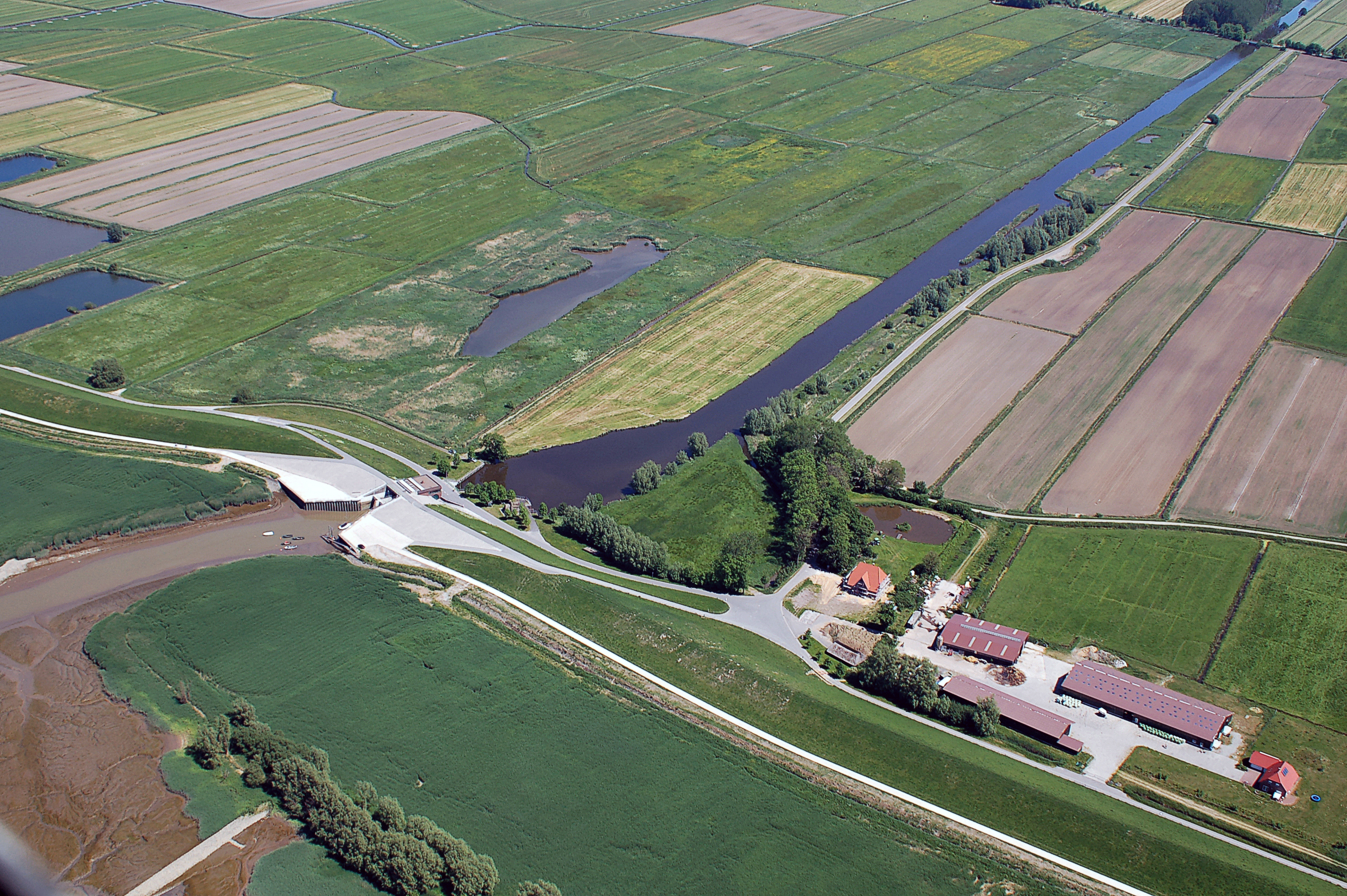 Luftbilder von der Nordseeküste 2012-05